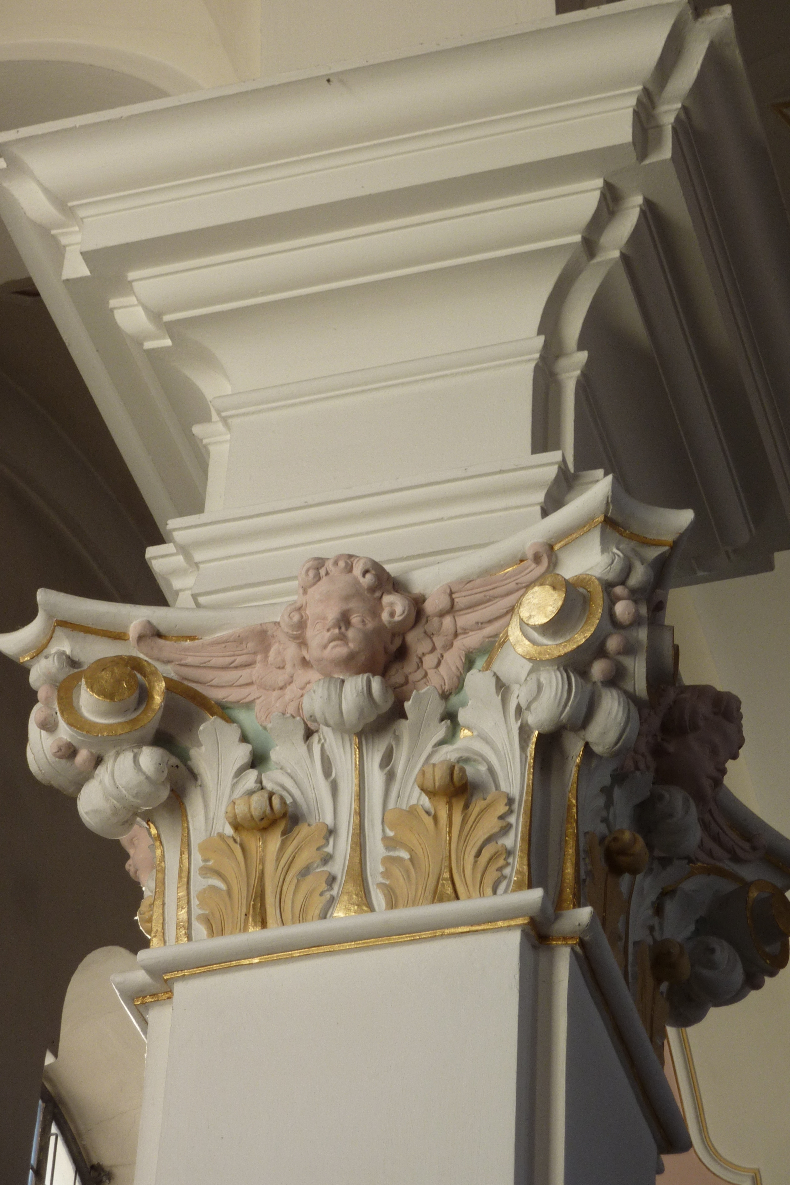 Blindheim, Pfarrkirche St. Martin, Kapitell